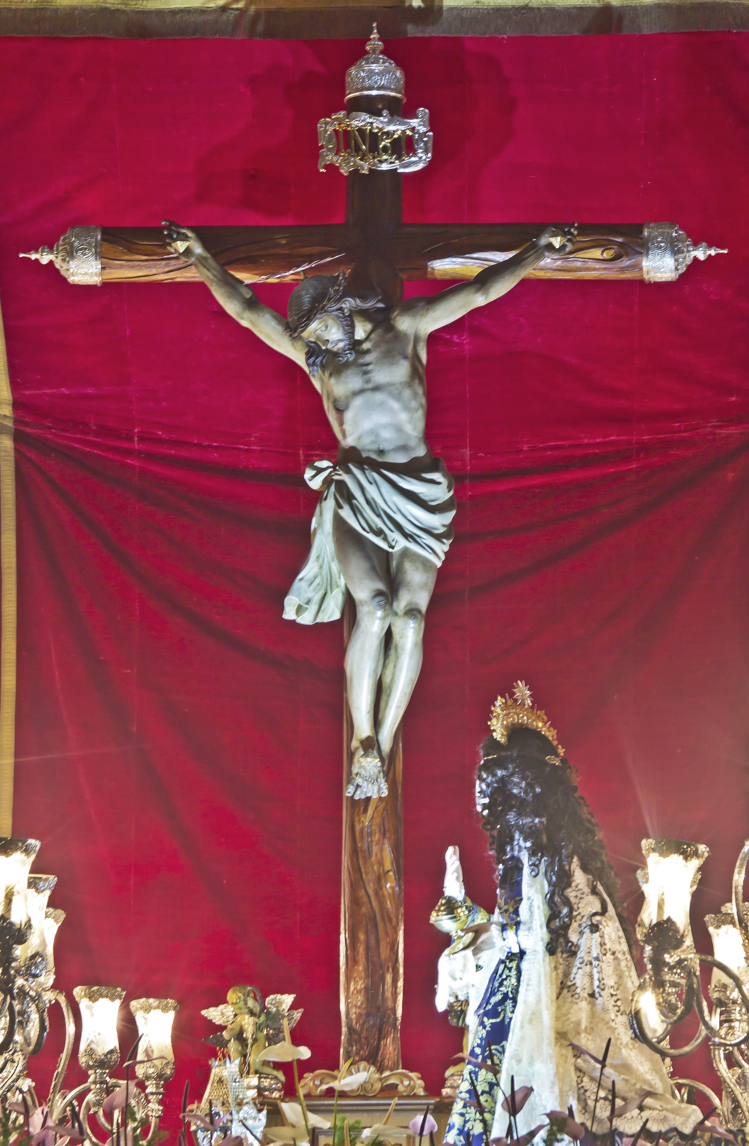 Paso del Cristo del Amor Misericordioso